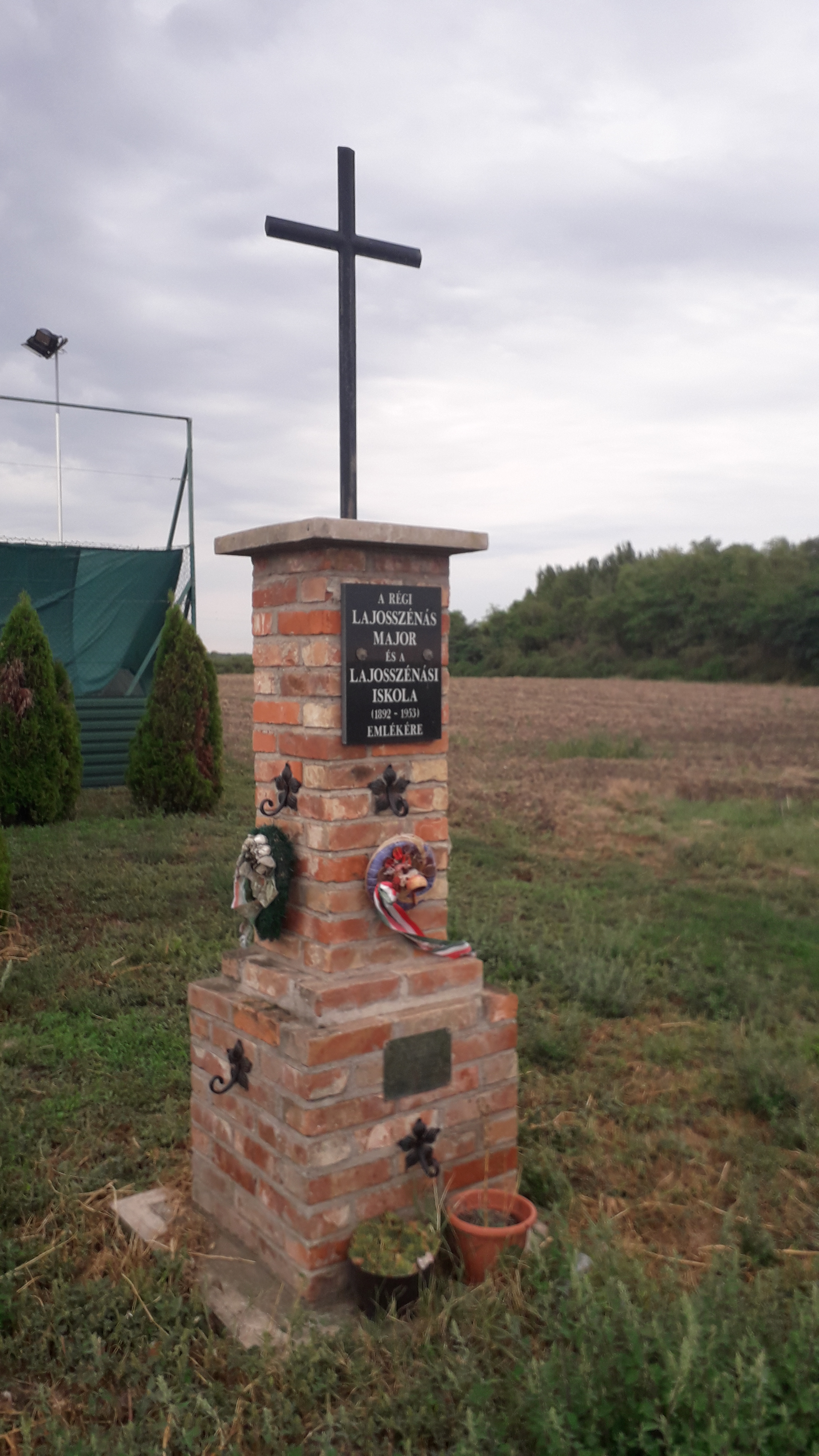 Lajosszénás major és a lajosszénási iskola emlékműve